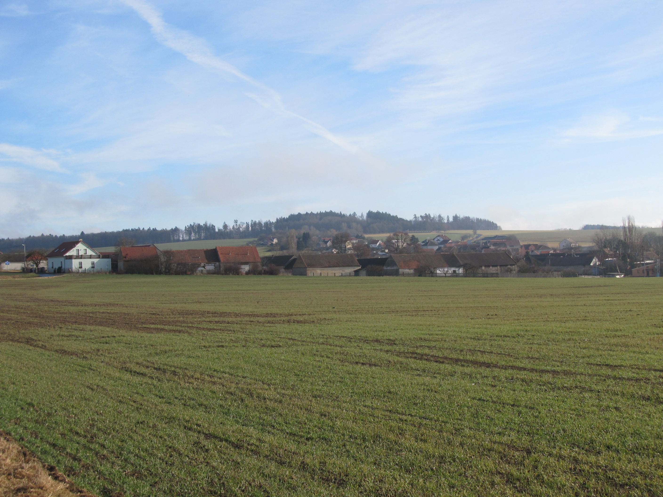 Milínov